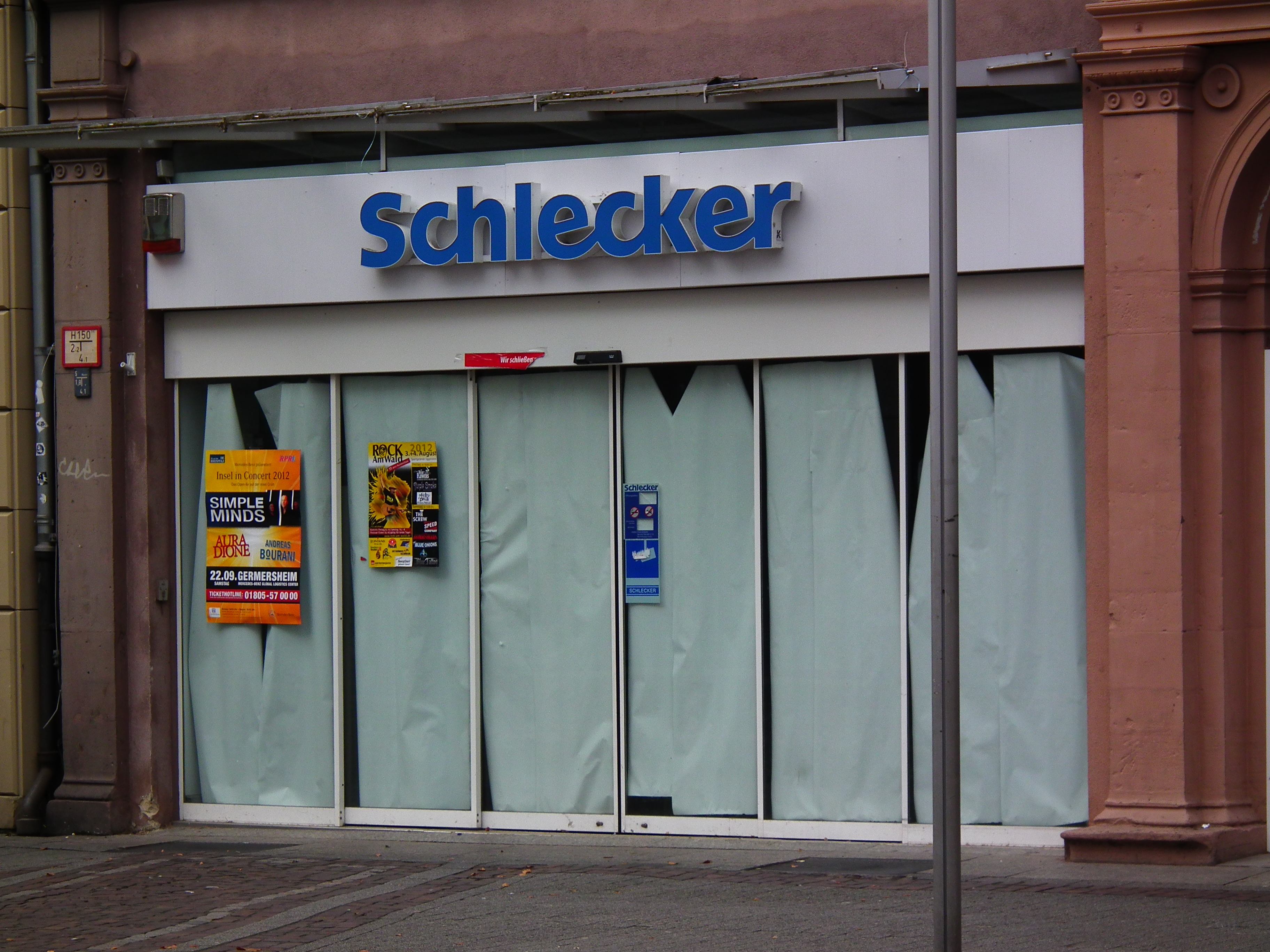 Geschlossene Schlecker-Filiale in der Karlsruher Innenstadt (Baden-Württemberg, Deutschland)